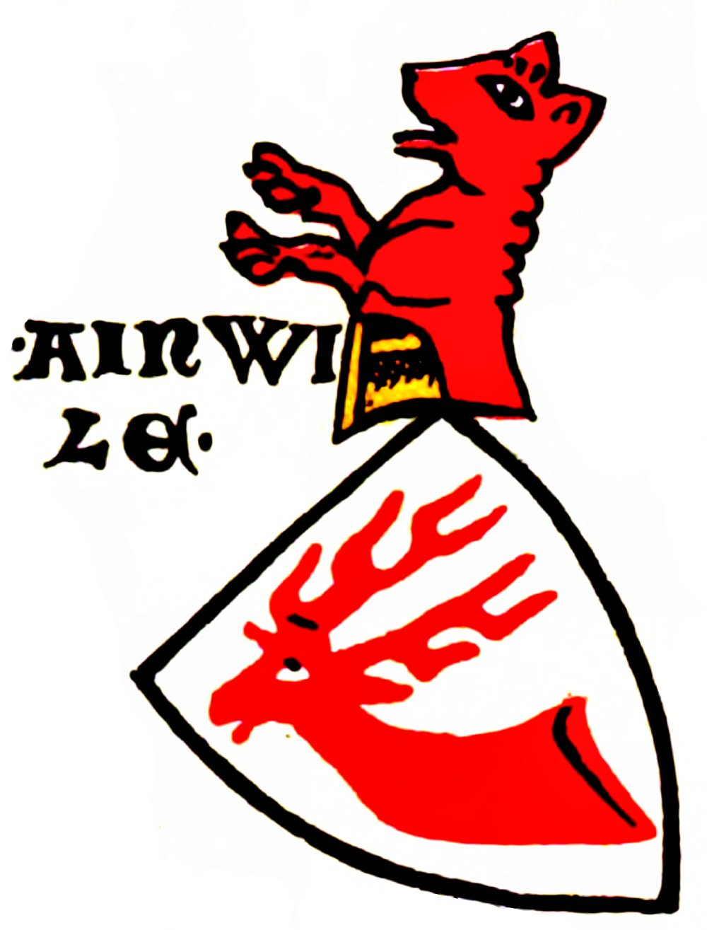 Wappen derer von Anweil (Ainwile, Anwile, Anwil, Anwyl)